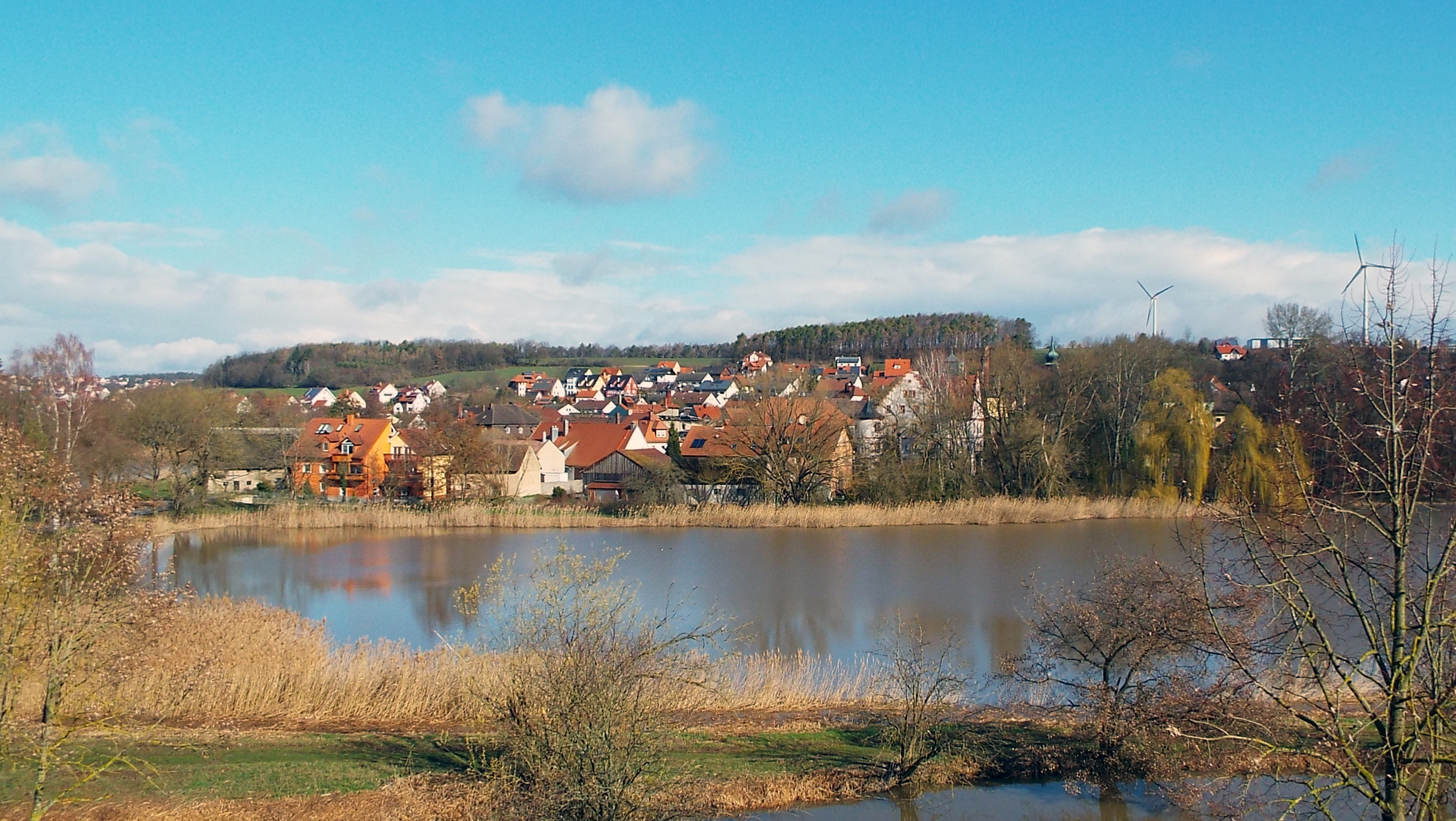 Trabelsdorf Ortsansicht: ehemals ein ritterschaftlicher Ort, dann bis 1978 eine selbständige Gemeinde, ist heute ein Ortsteil der Gemeinde Lisberg im Landkreis Bamberg. Der Sitz der Verwaltungsgemeinschaft Lisberg befindet sich im Schloss Trabelsdorf.